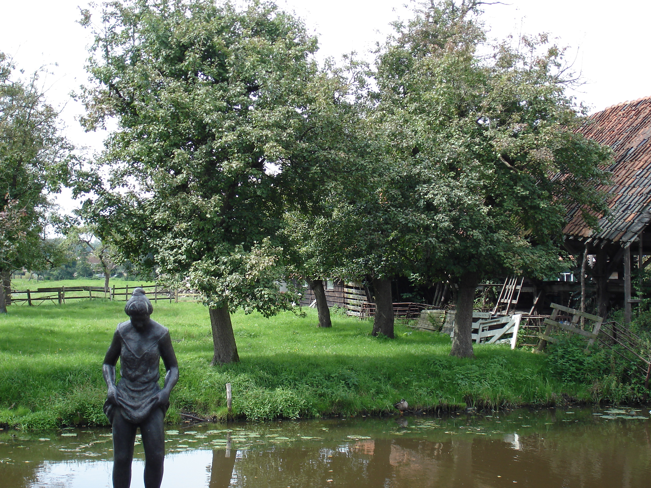 Omschrijving